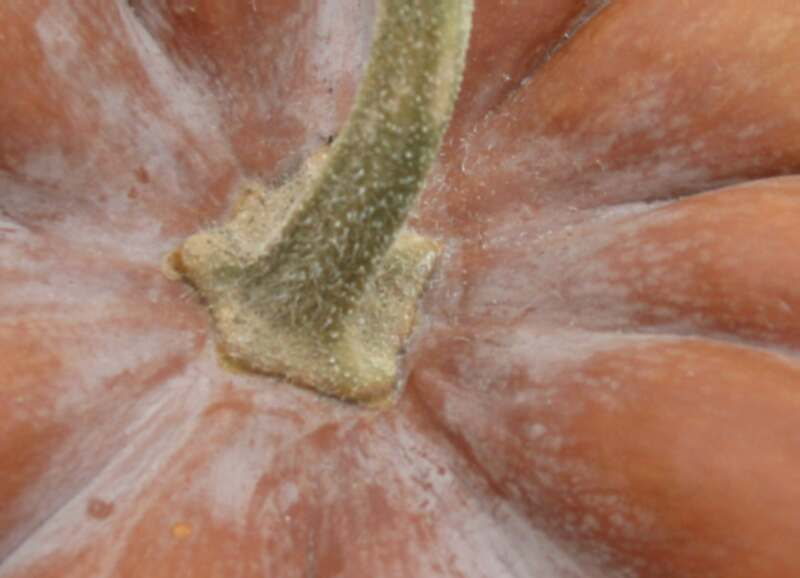 Pédoncule de courge musquée (Cucurbita moschata) Photo JH Mora, juin 2005